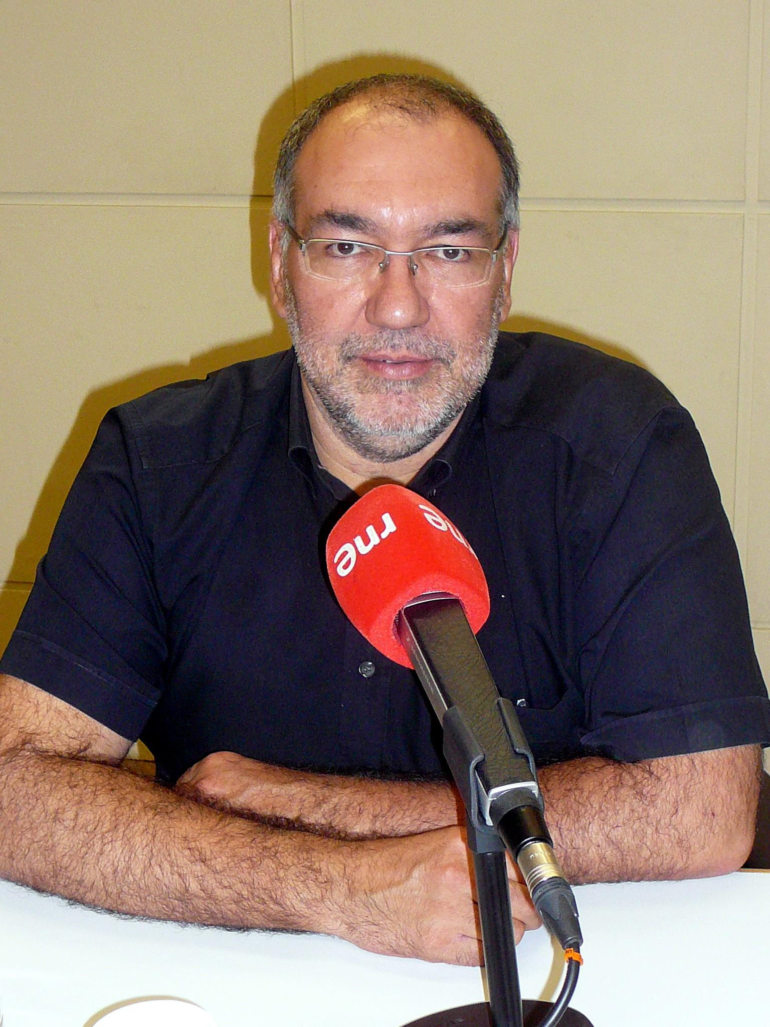 Investigador Químico del CSIC